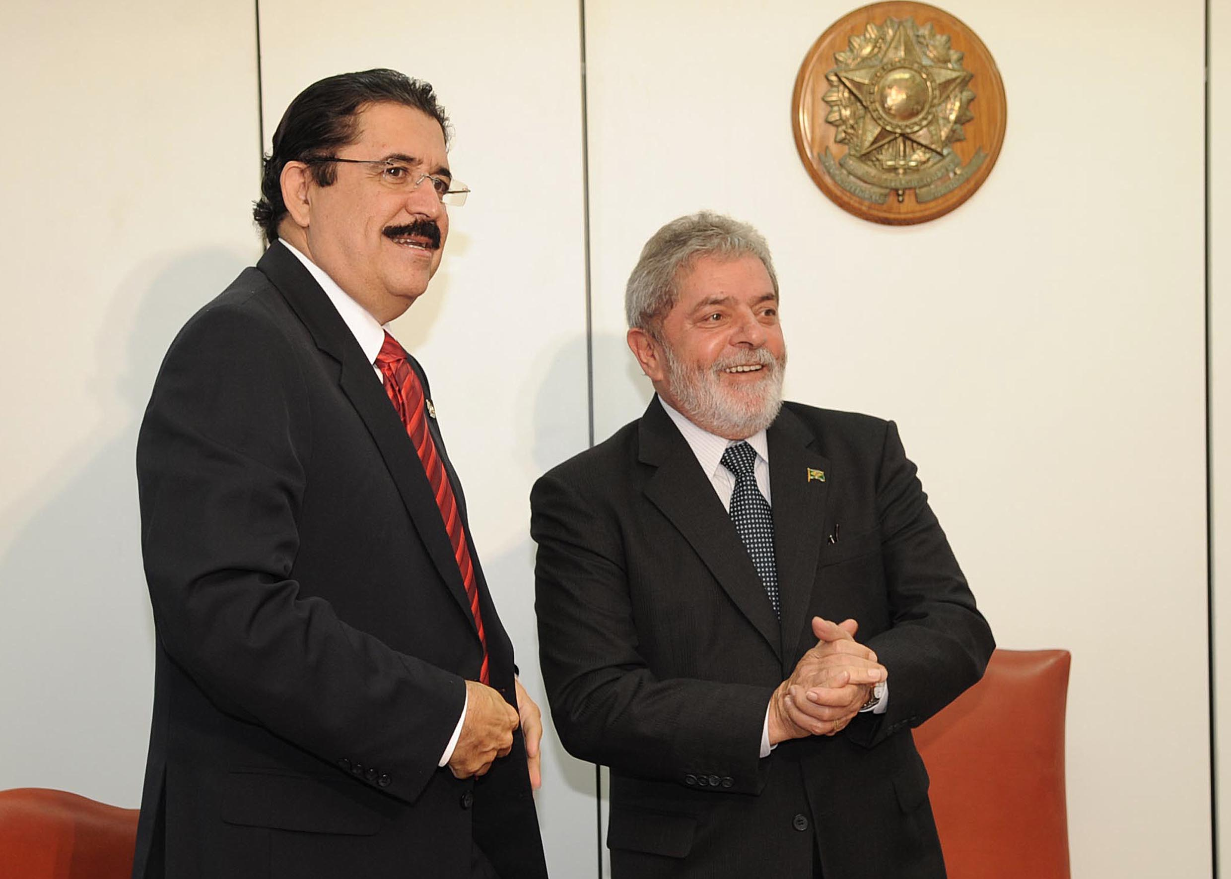 O presidente Luiz Inácio Lula da Silva recebe em audiência o presidente de Honduras, José Manuel Zelaya.